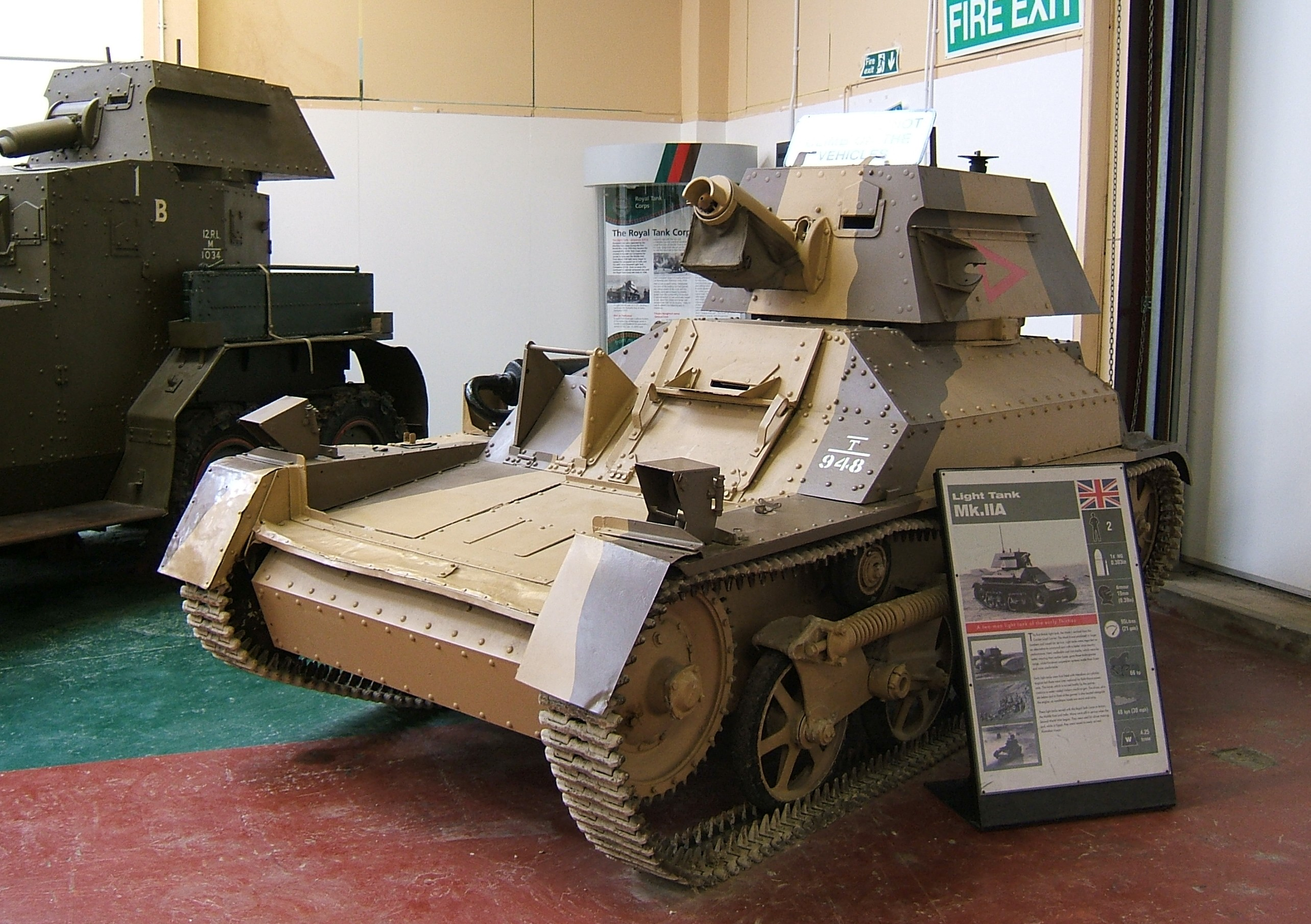 Brytyjski czołg lekki Tank, Light, Mk IIA, zdjęcie zrobione w Bovington Tank Museum.